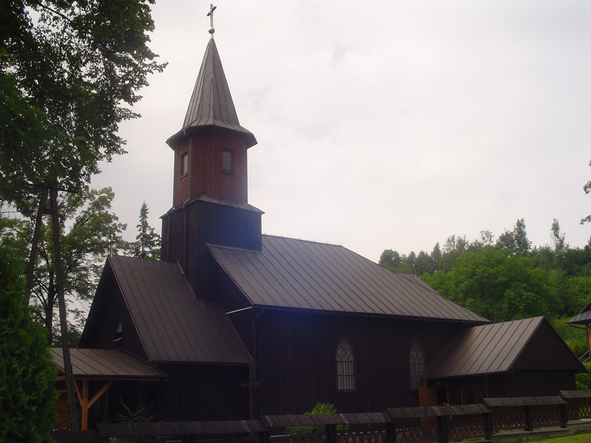 Kościół parafialny pw. Nawiedzenie Najświętszej Maryi Panny w Juszczynie, województwo śląskie, powiat żywiecki